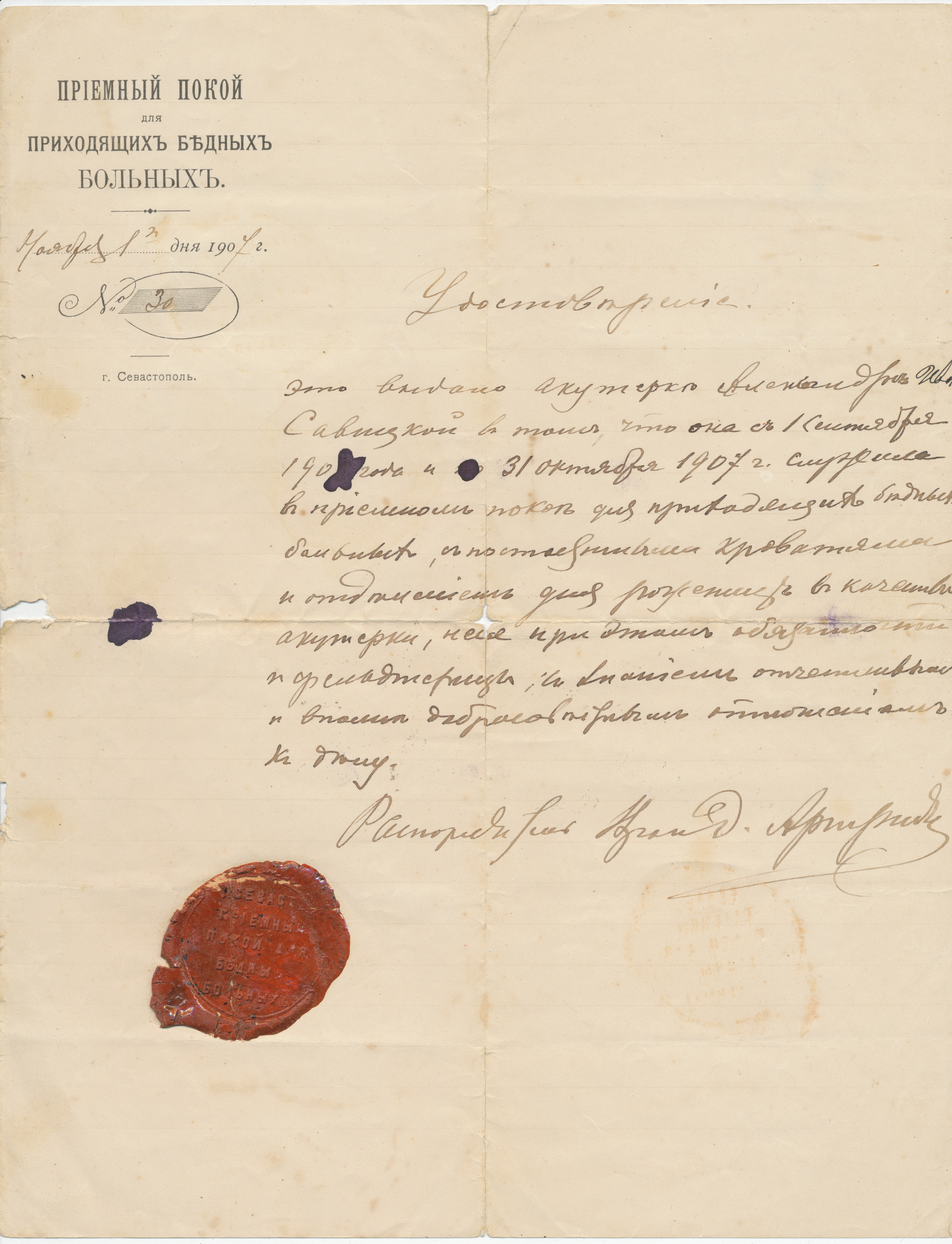 Удостоверение акушерки приёмного покоя для приходящих бедных больных г. Севастополя. Удостоверение. Это выдано акушерке Александре Ивановне Савицкой в том, что она с 1 сентября 1905 года и по 31 октября 1907 г. служила в приемном покое для приходящих бедных больных, с постоянными кроватями и отделением для рожениц в качестве акушерки, неся при этом обязанности и фельдшерицы, с знанием отчетливым и вполне добросовестным отношением к делу. Распорядитель ...